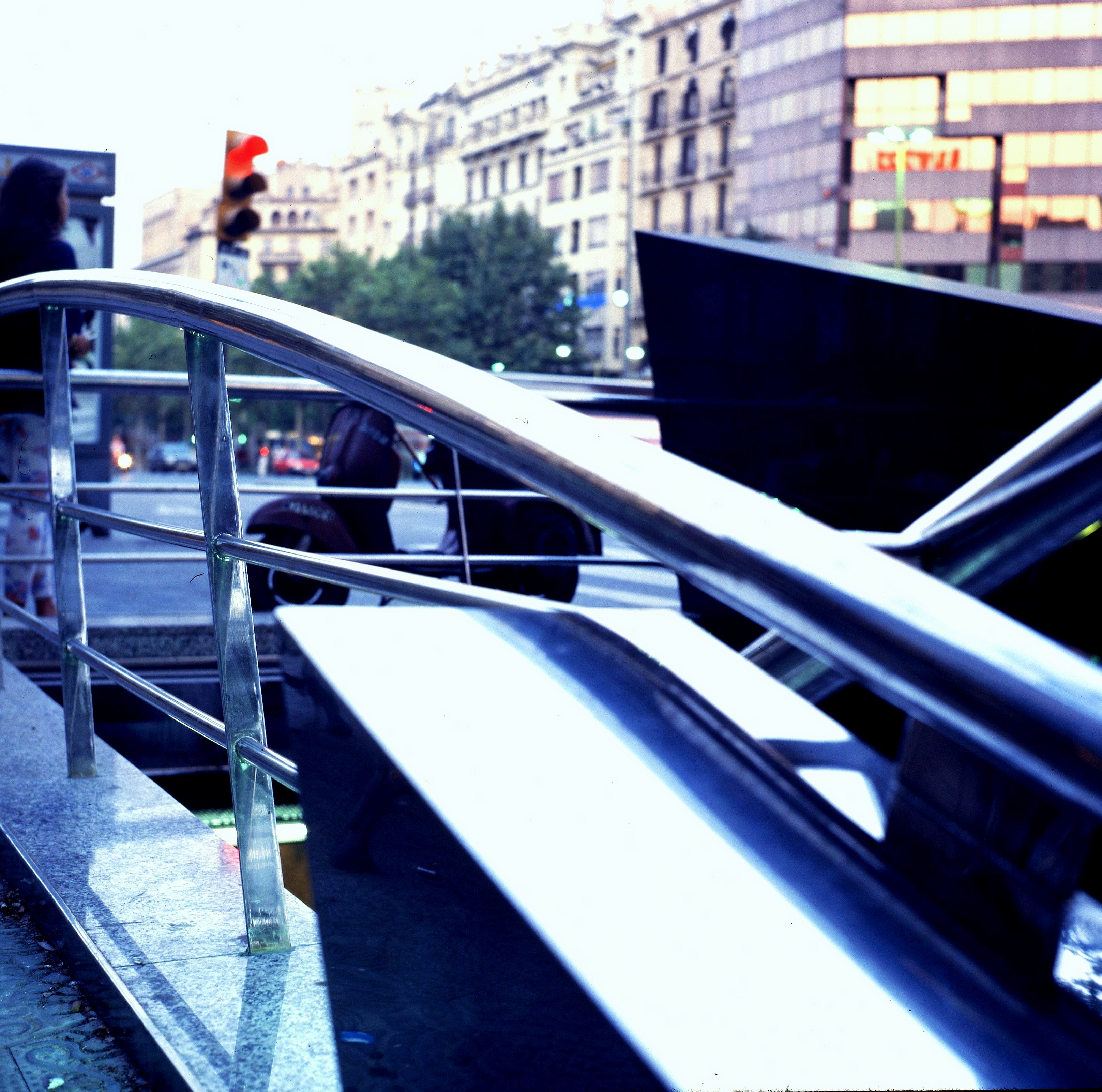 Acceso Estación Paseo de Gracia 1991 ("la deconstrucción del modelo Barcelona")